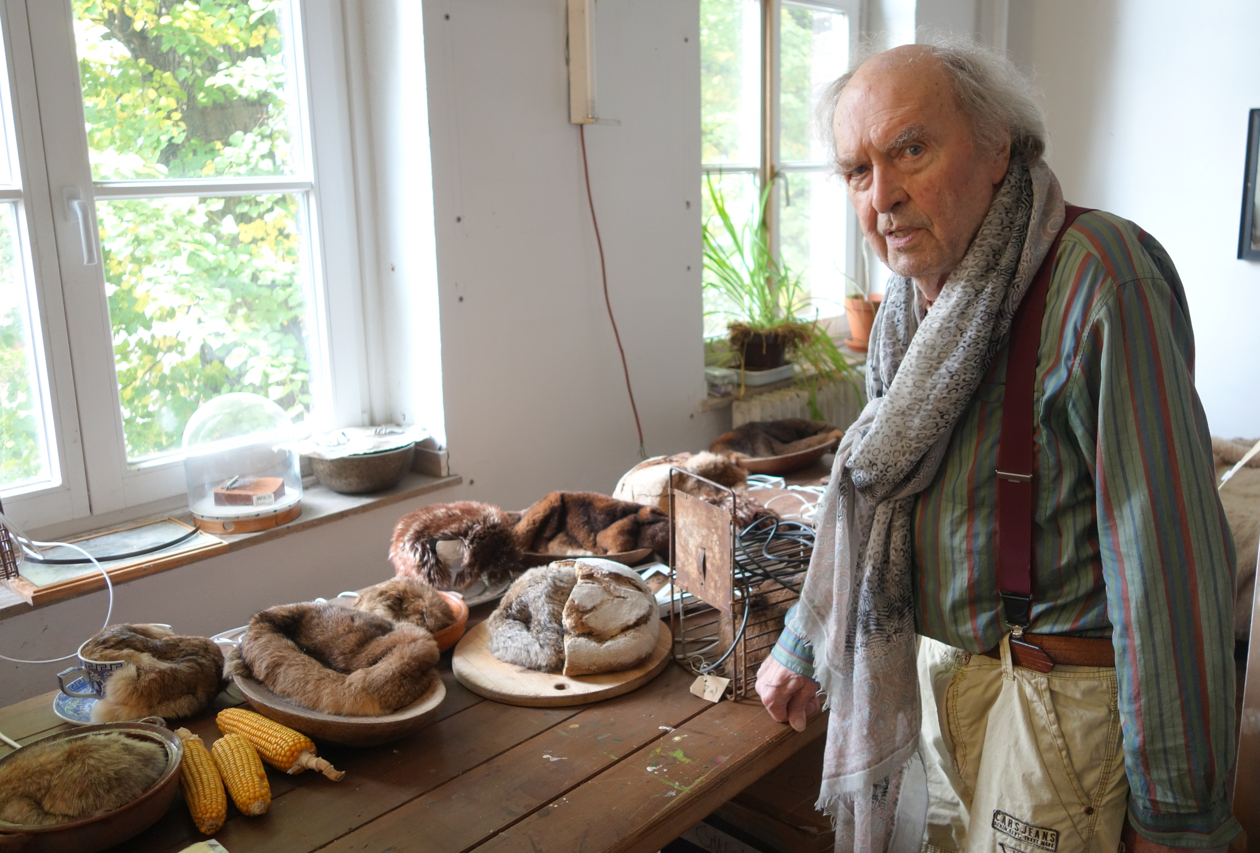 Besuch bei Günter Weseler im Atelierhaus, Düsseldorf-Niederlörick, September 2018.